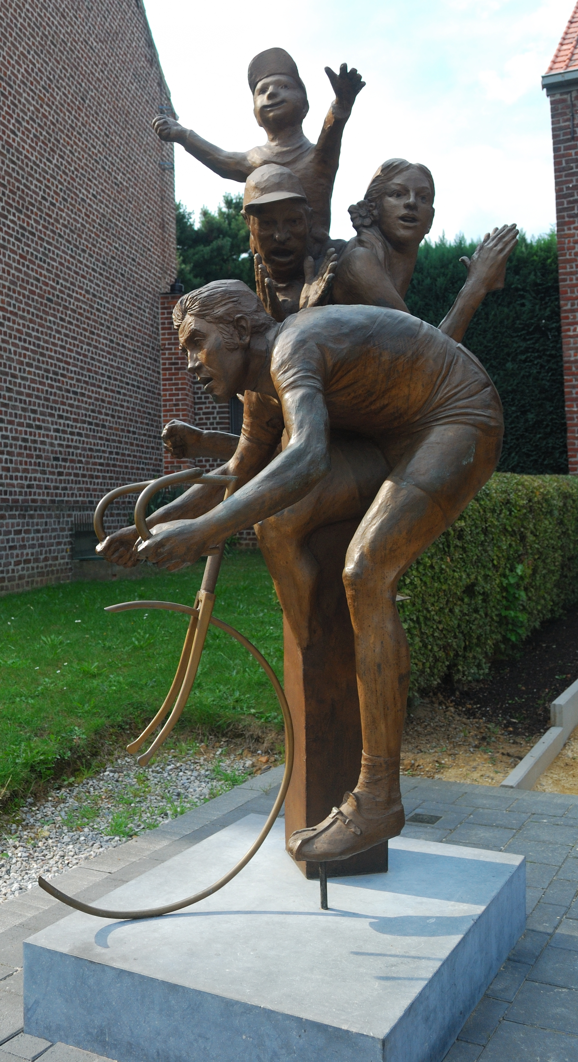 Standbeeld voor de wielerkampioen Eddy Merckx in zijn geboortedorp Kiezegem, gemeente Tielt-Winge. Bronzen sculptuur door Luc de Blick, onthuld door Eddy Merckx tijdens de doortocht van de Ronde van Frankrijk op 6 juli 2015. Nikon D60 f=20mm f/5.6 bij 1/125s ISO 200. Cadrage in GIMP 2.6.11.